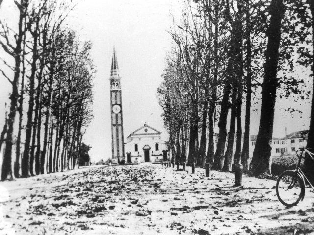 Il centro di Mogliano Veneto nel 1896; si noti l'originario aspetto della chiesa prima degli interventi di pochi anni dopo